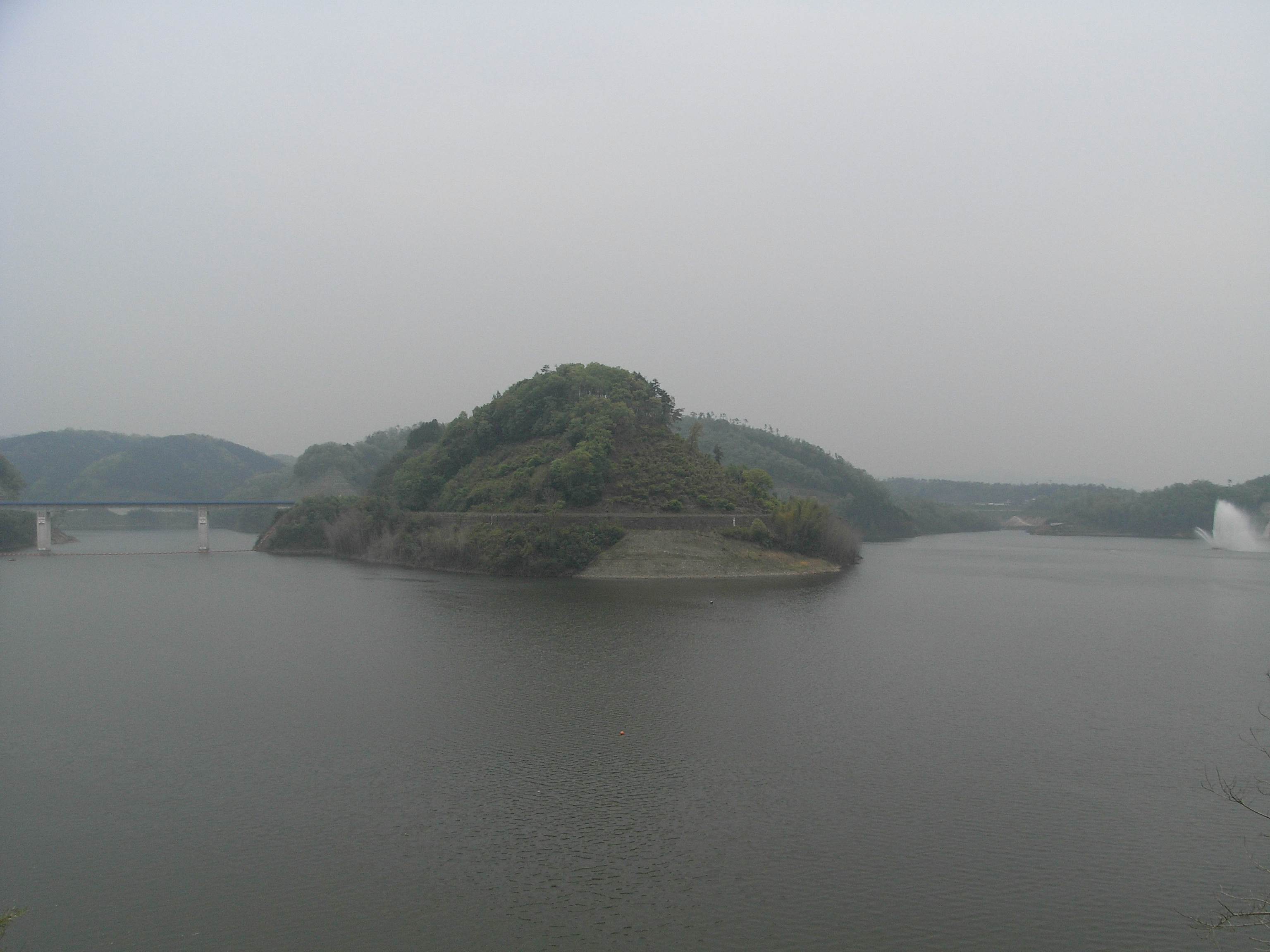 Valley